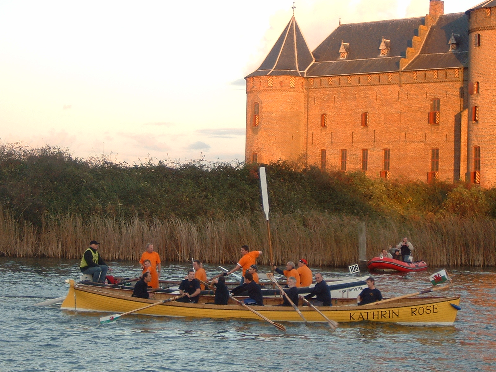 Foto van Leonard Springer